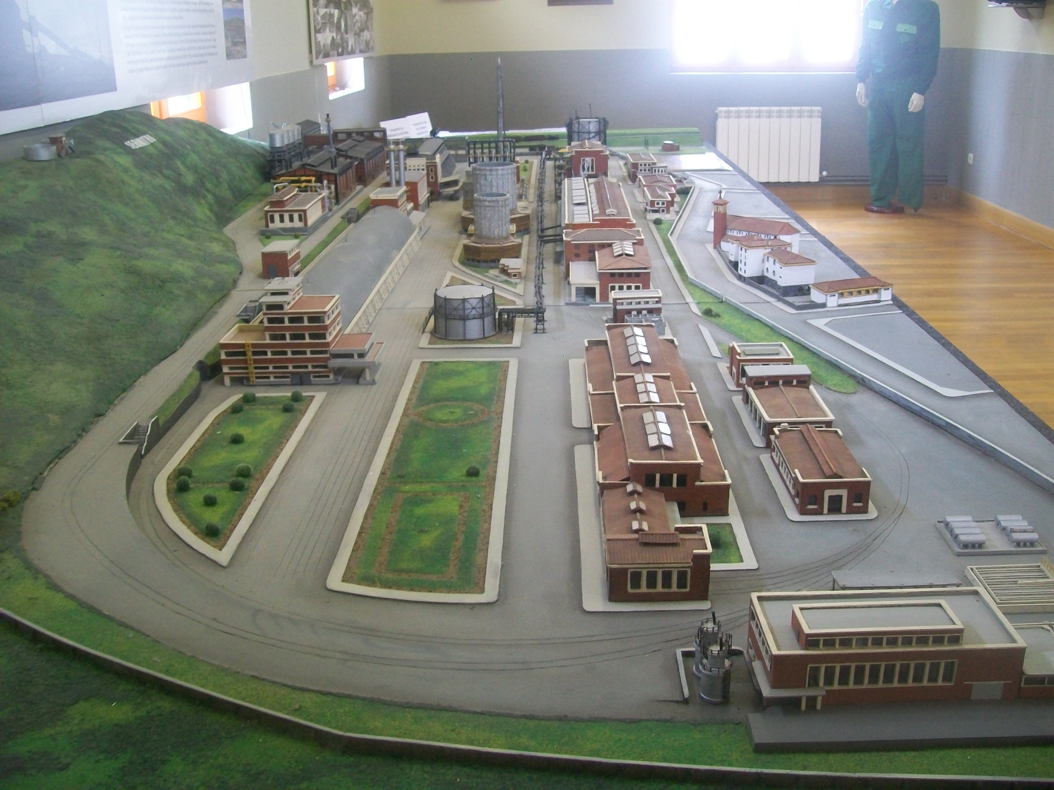 Maqueta lateral de Sefanitro